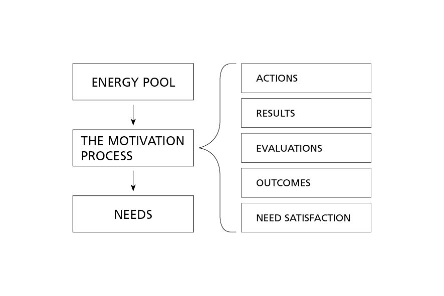 Graphische Darstellung der von Robert Pritchard und Elissa Ashwood aufgestellten Motivationstheorie (2008).